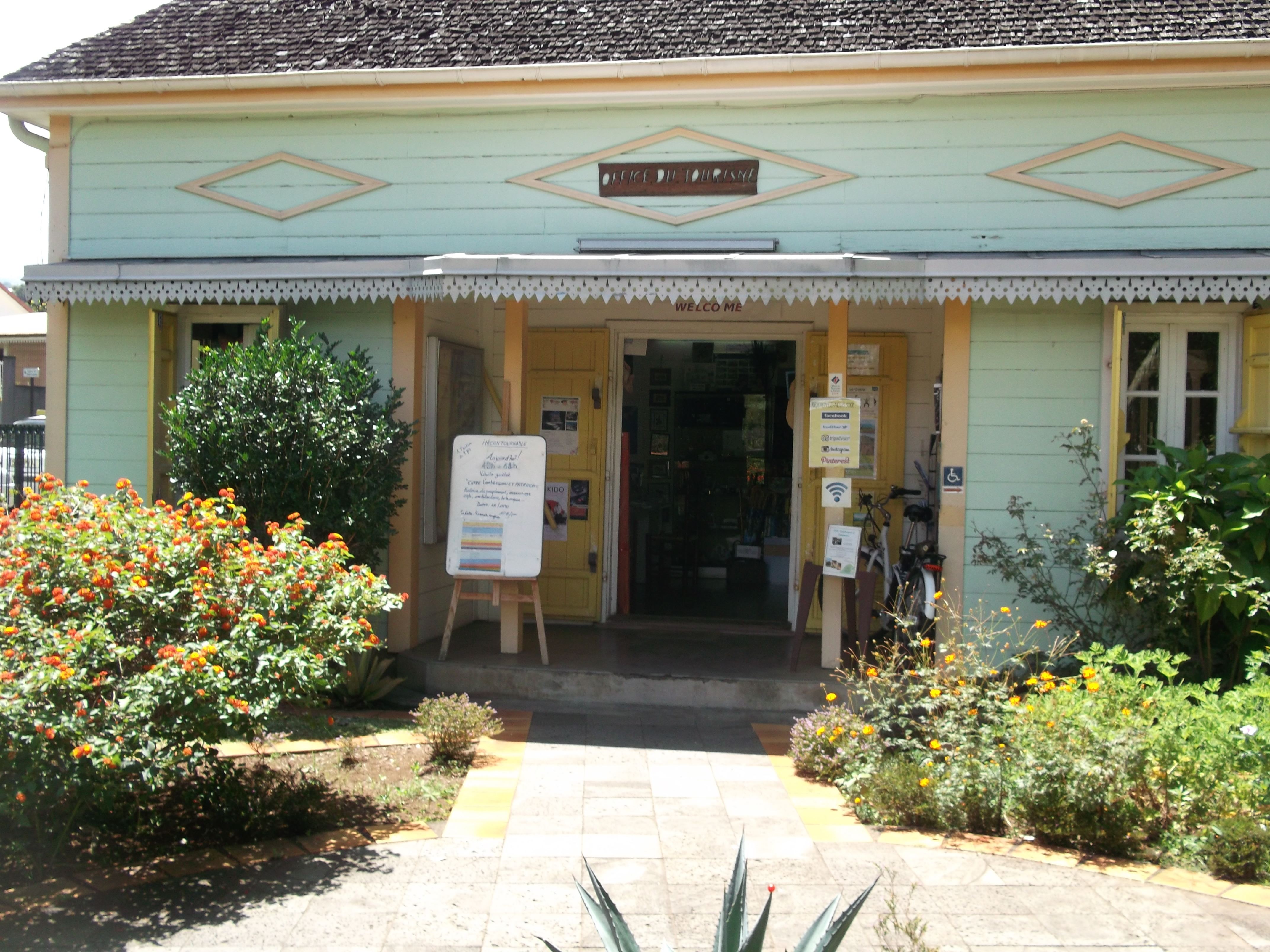 ancienne petite case créole rénovée